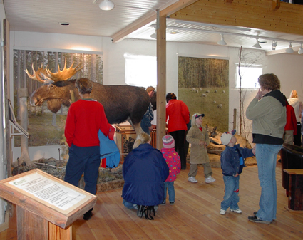 Älgen på Grimsös utställning, "Naturligtvis".